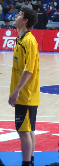 Partido Real Madrid-CB Canarias, marzo 2015